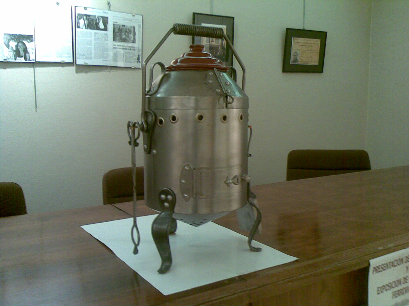 Olla ferroviaria durante una exposición en Guardo, Palencia (España)